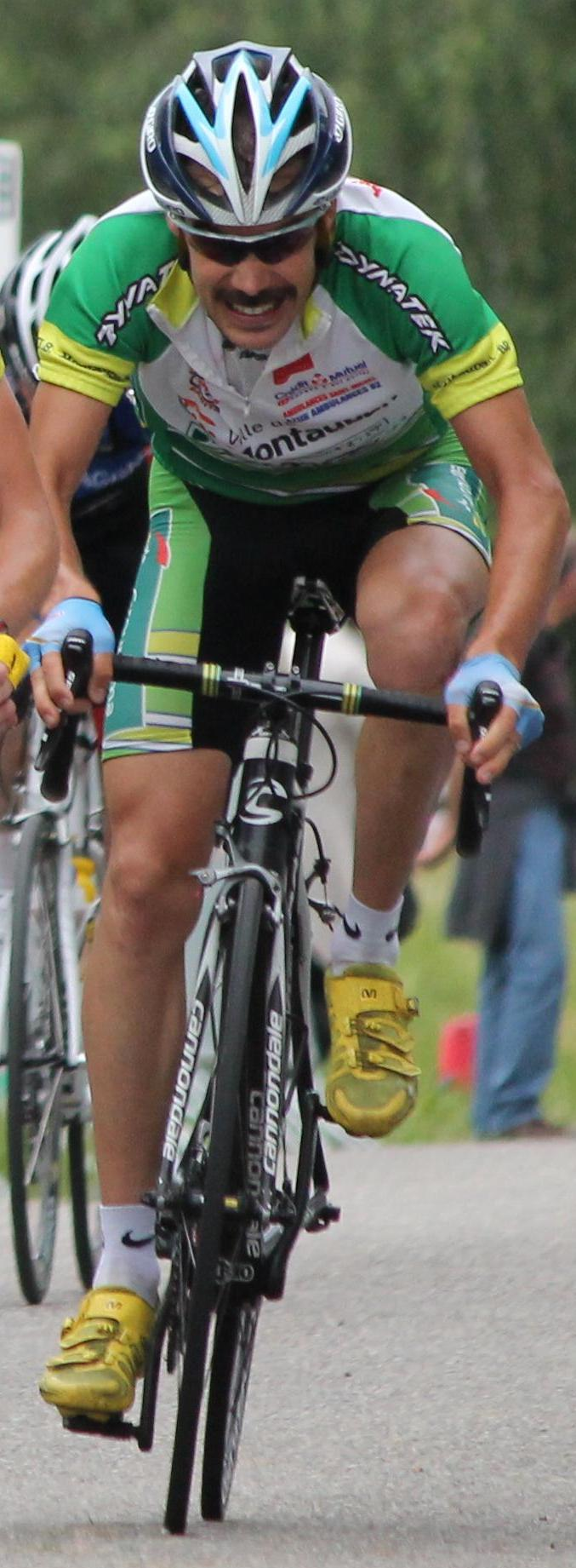 Arrivée de Julien Mazet (US Montauban) sur la ligne d'arrivée du Circuit du Fau à Montauban à l'occasion des Championnats de Midi-Pyrénées de cyclisme 2012 (1ère catégorie).